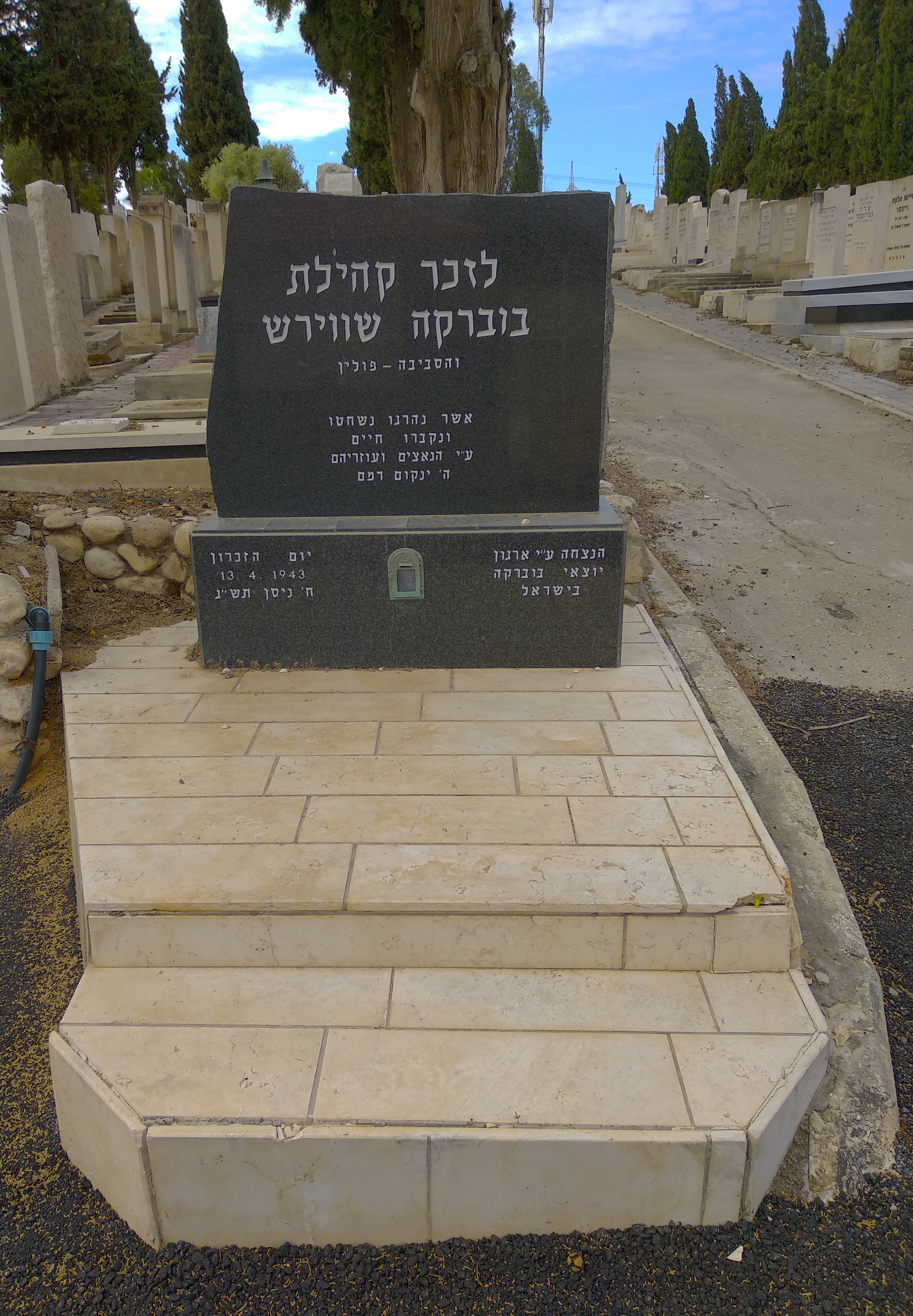 אנדרטה לזכר בני קהילות בוברקה שווירש שנספו בשואה, בבית הקברות ברעננה